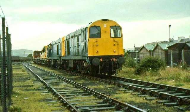 Girvan goods yard